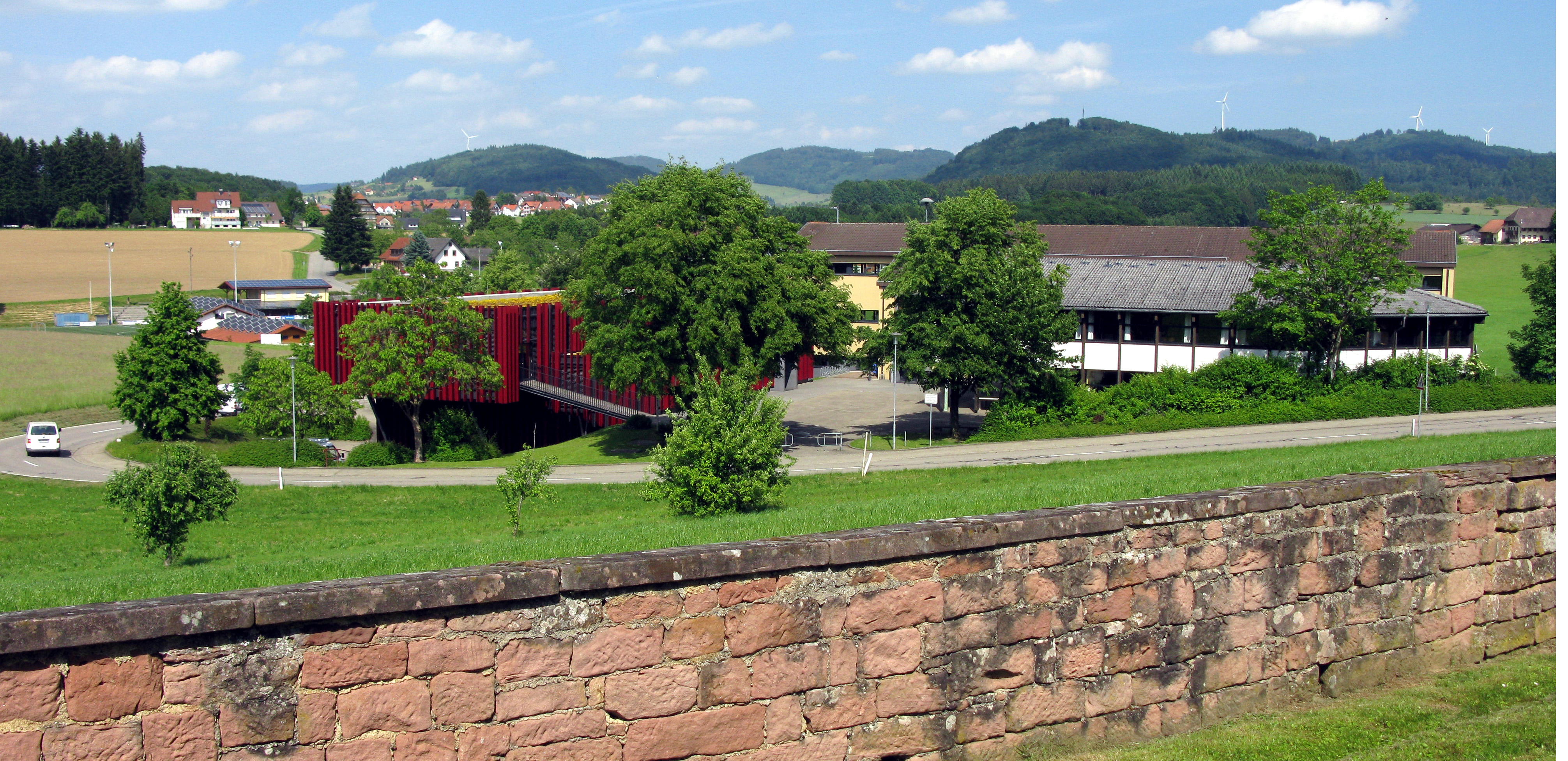 Blick vom Friedhof in Freiamt-Mußbach auf das Schulzentrum